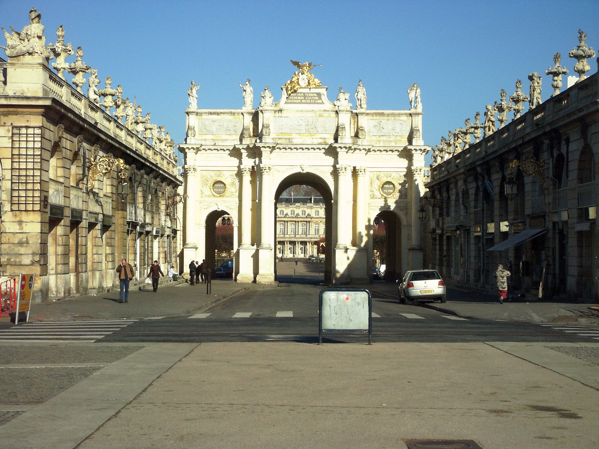 Nancy, Porte Héré